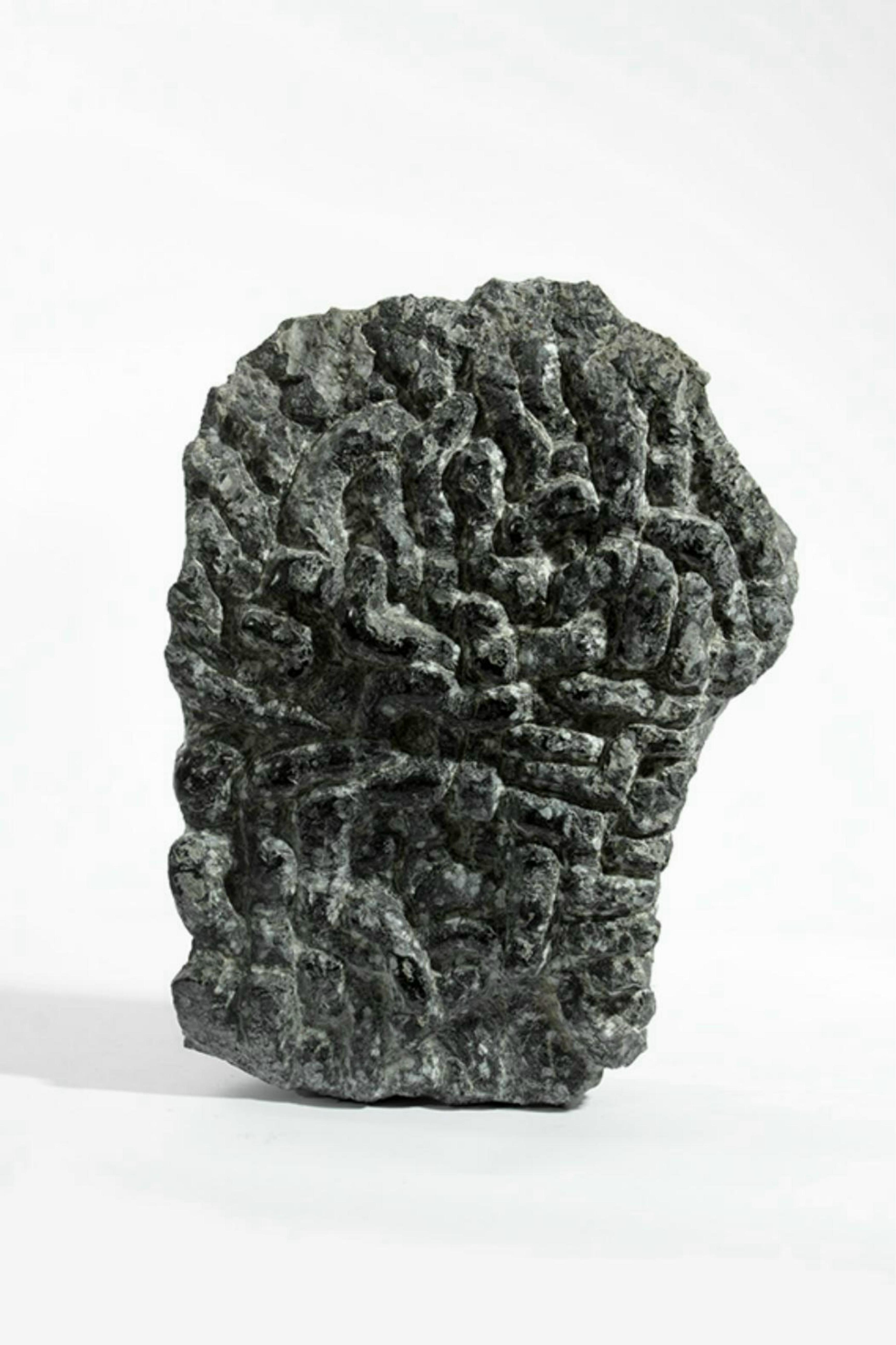 Medusa (Eva Backofen)